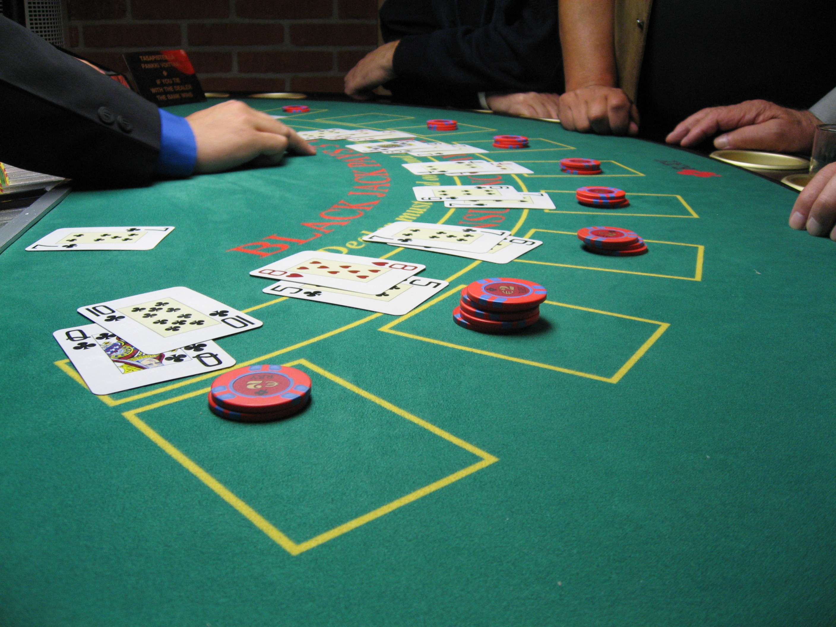 Erfugj